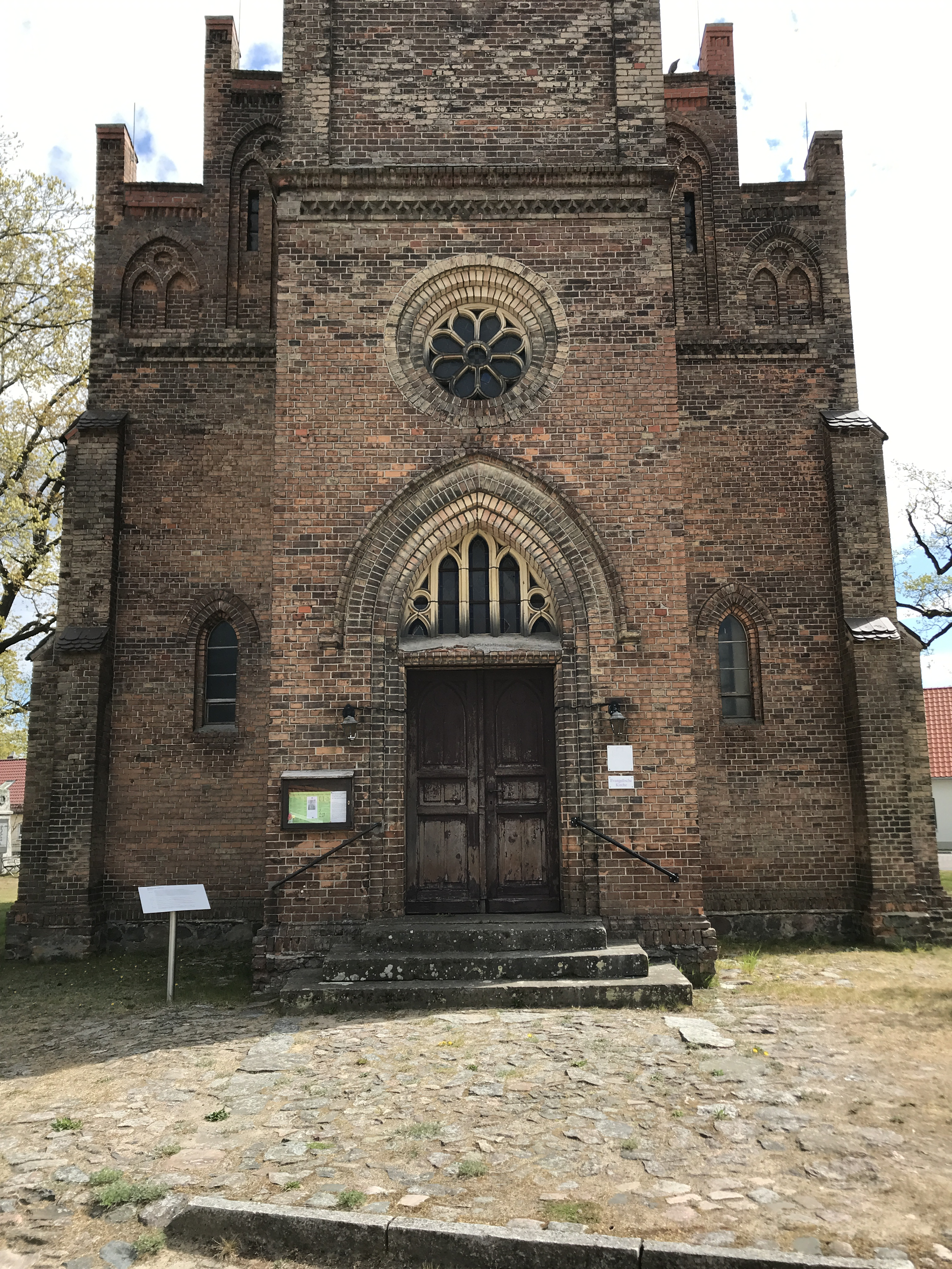 Die Dorfkirche Kablow ist eine neogotische Saalkirche in Kablow, einem Ortsteil der Stadt Königs Wusterhausen. Im Innern steht unter anderem ein Altar von 1516.